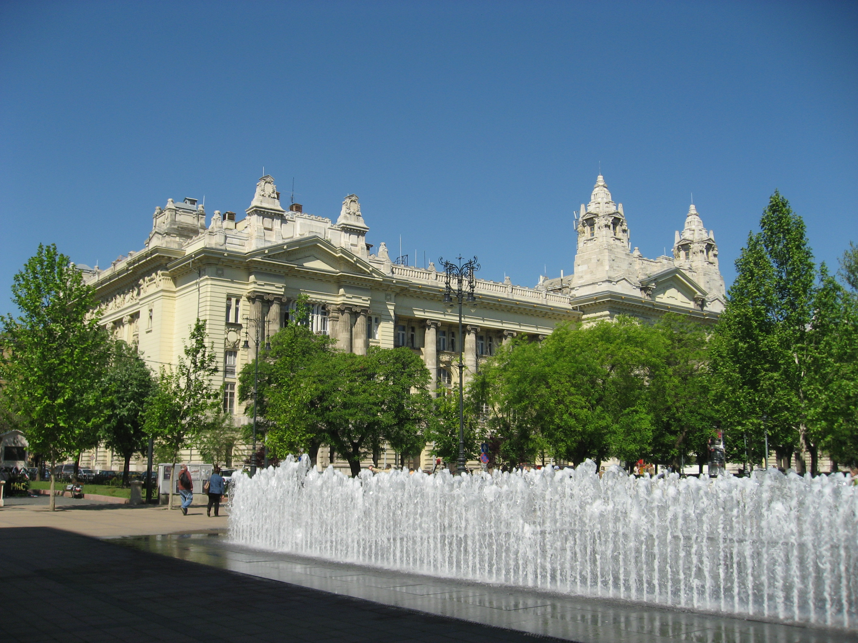 Budapešť